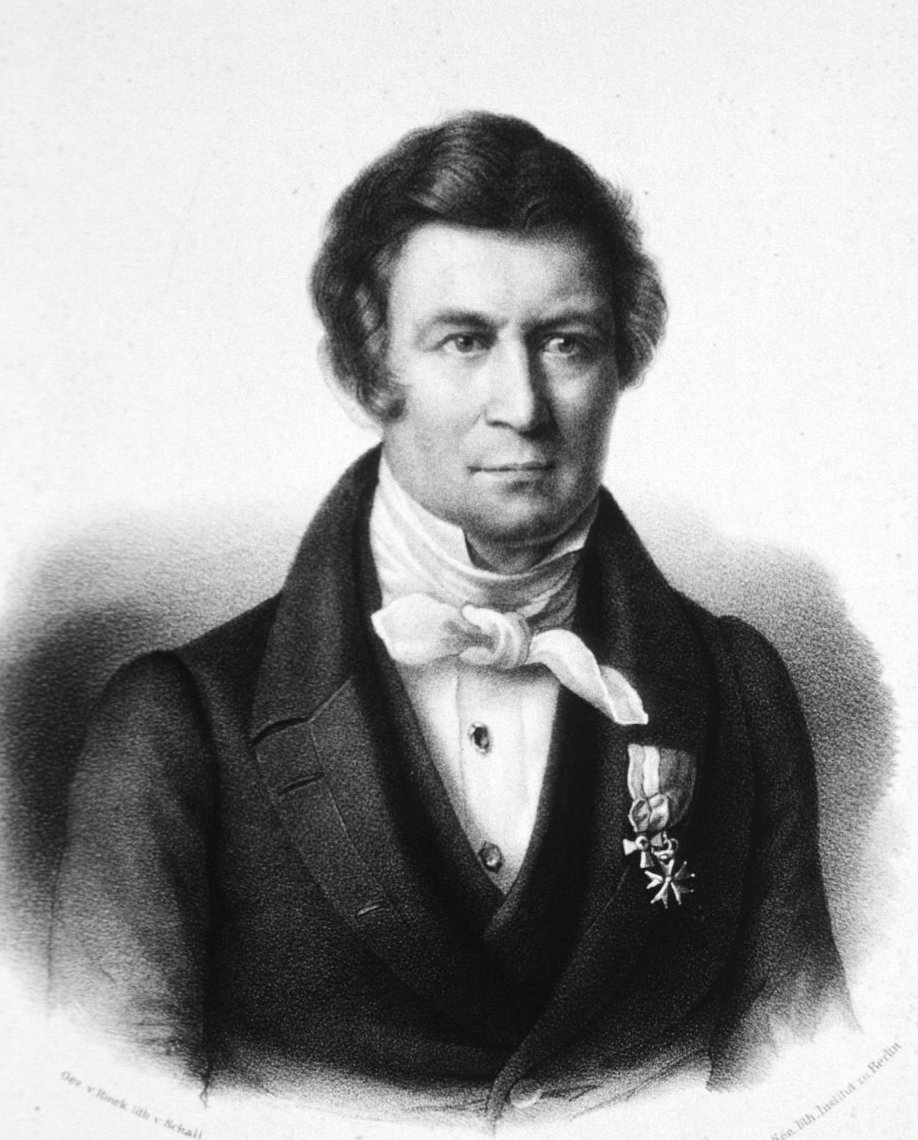 Carl Sigismund Kunth (June 18, 1788 – March 22, 1850)